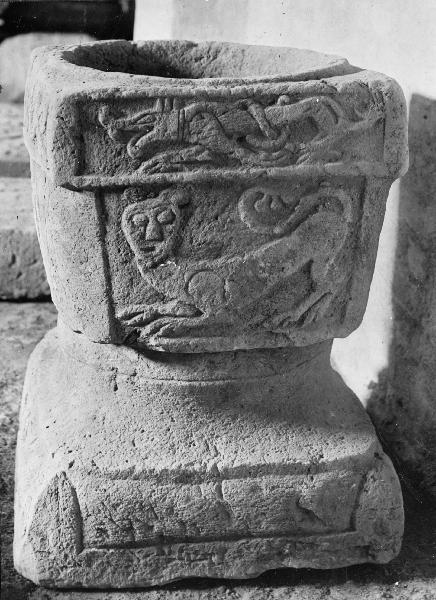 Interiör mot väster, orgeln har tillhört Carl Johans kyrka, Göteborg. Kategori: (02) InteriörerInteriör mot väster, orgeln har tillhört Carl Johans kyrka, Göteborg.